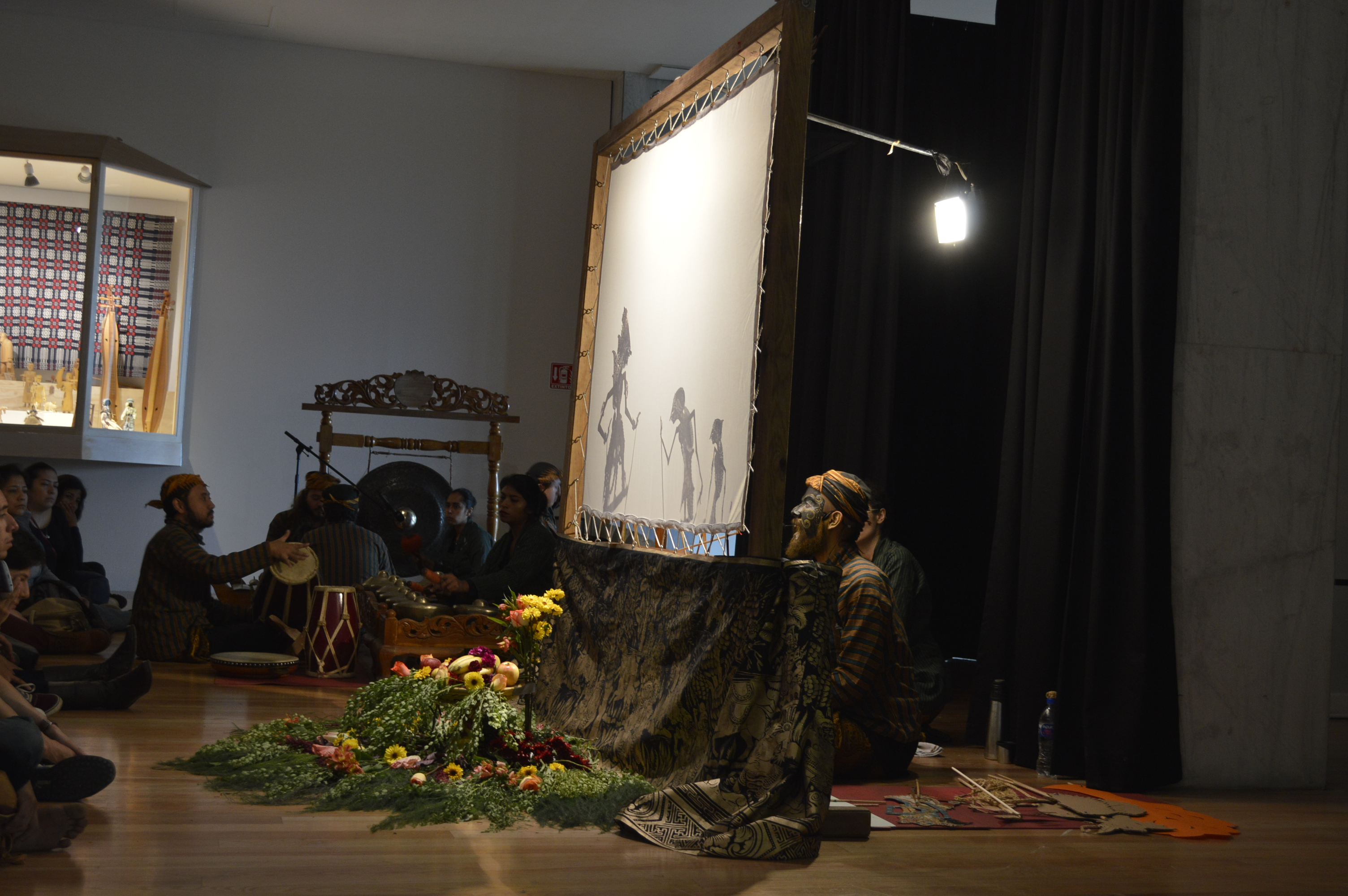 gamelan indra swara presentacion de titere de sombra en el CCU Unam CDMX